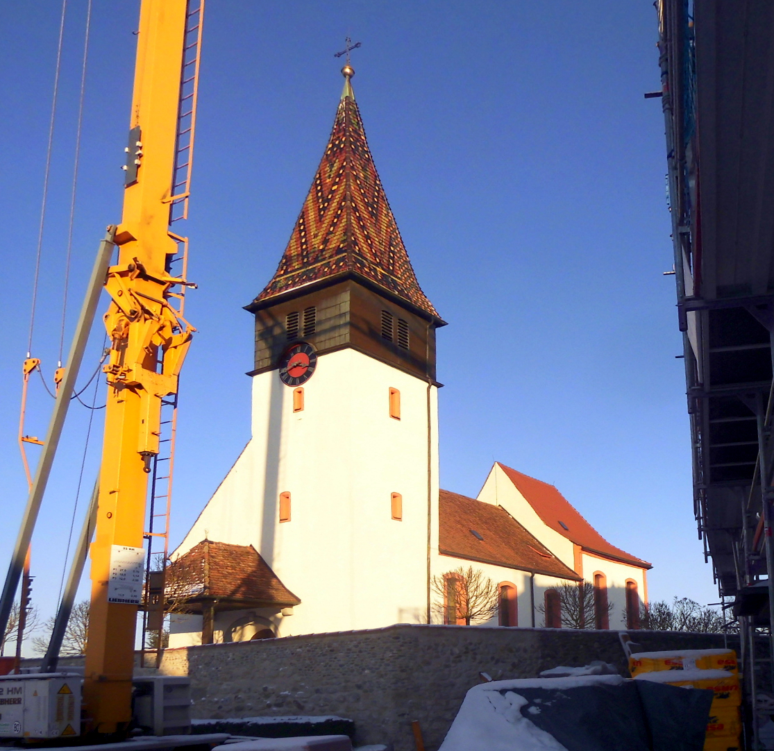 Kirche St. Nikolaus in Dingelsdorf, Stadt Konstanz